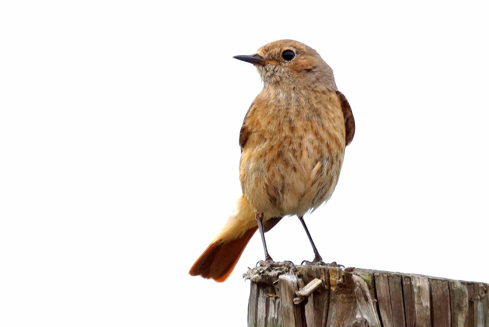 Leppälintu naaras Pälkäne Sappeenvuori